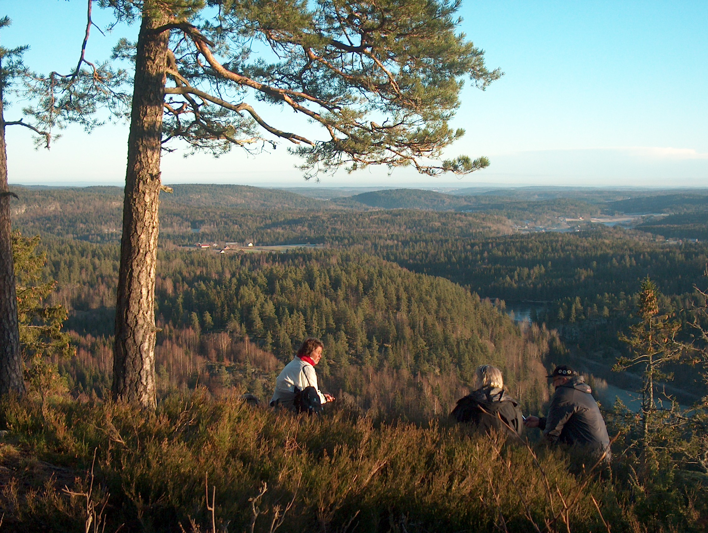 Andebu - skog og vann